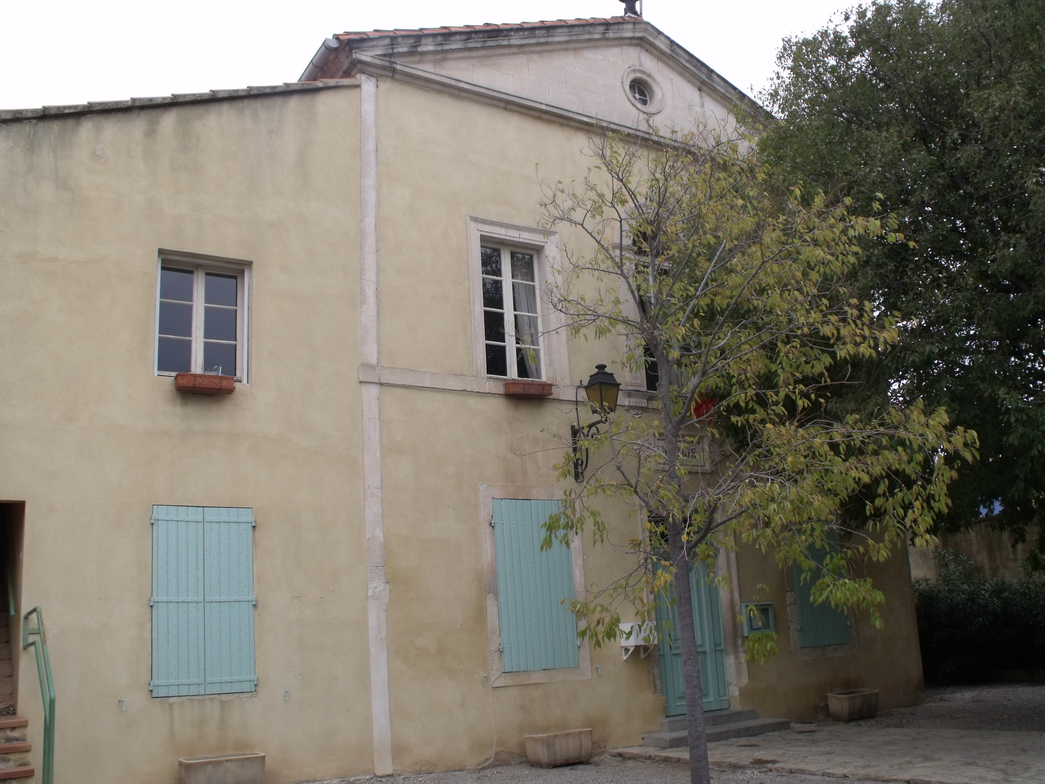 Mairie d'Aureille (Bouches-du-Rhône).